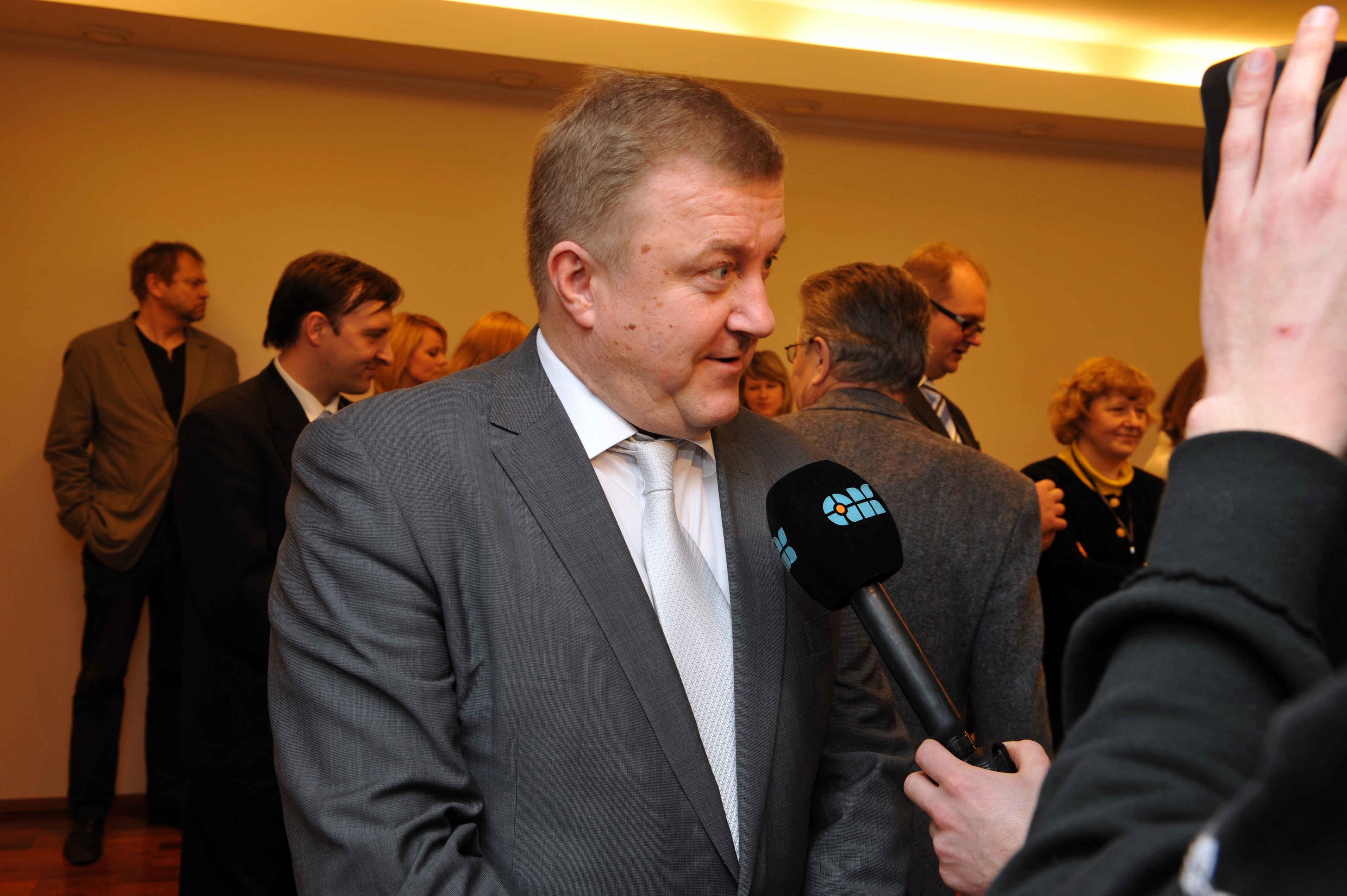 Aivar Mäe